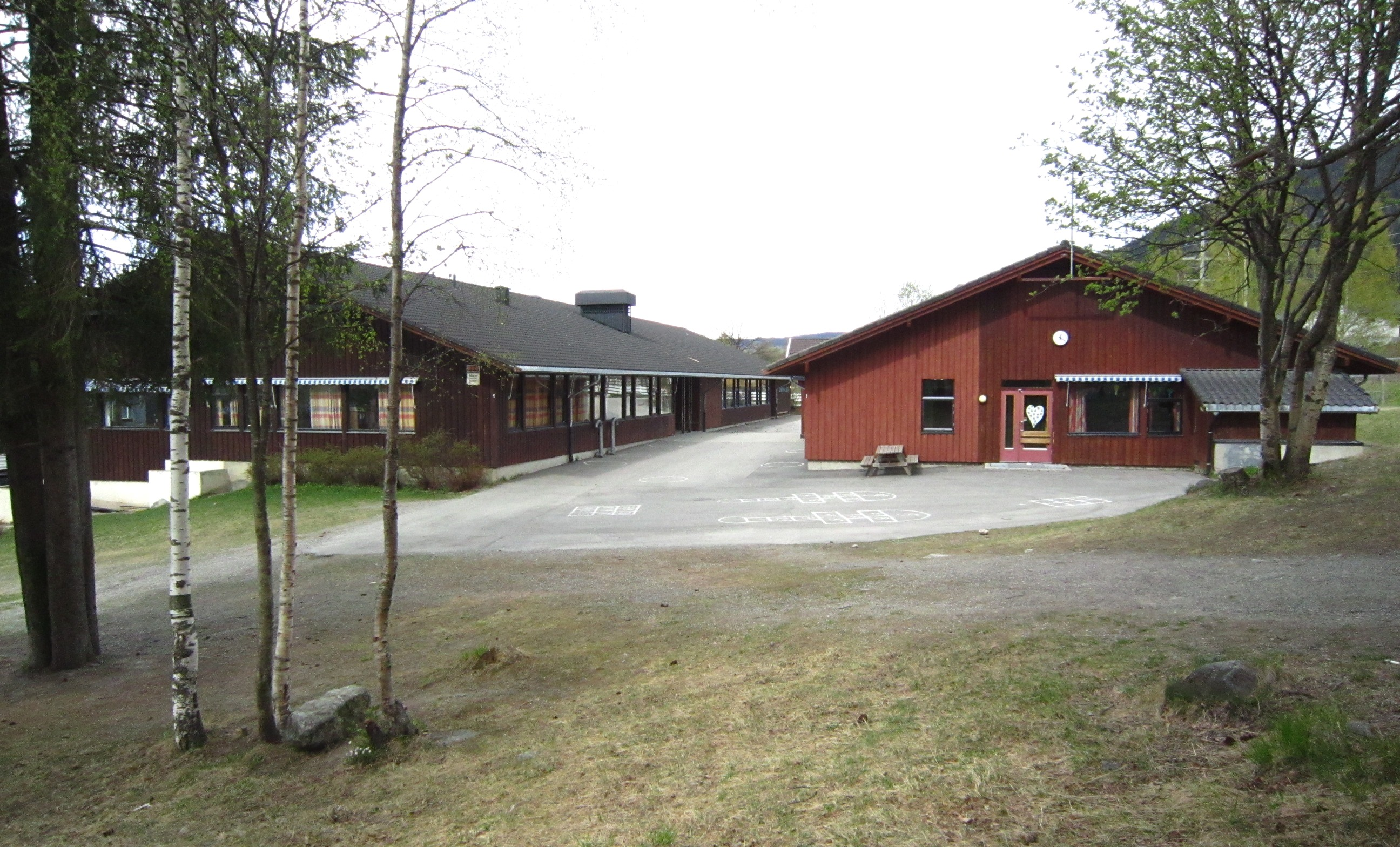 Ekrom skole på Lillehammer